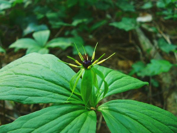 parisette (autre angle), Gy.